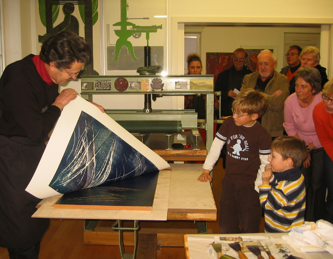 Auf dem Bild ist zu sehen, wie im Holzschnitt-Museum an der Grieshaber-Presse gedruckt wird.